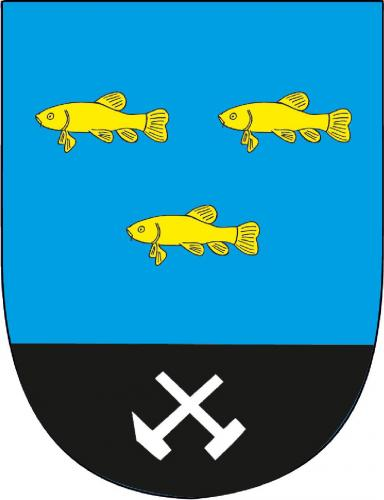 Líně znak